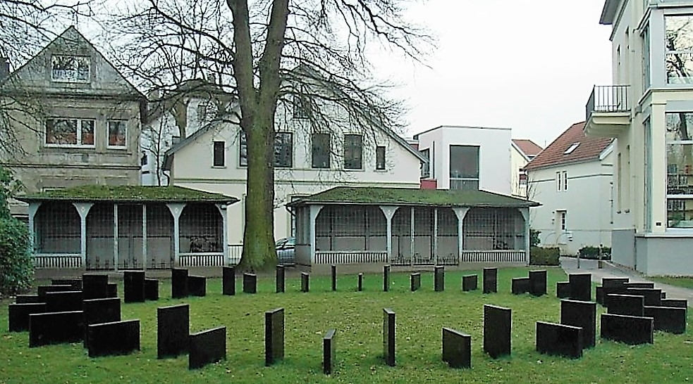 Zwei ehemalige Pavillons eines Krankenhauses aus dem 19. Jahrhundert, die Patienten mit Bettruhe einen geschützten Aufenthalt an der frischen Luft boten